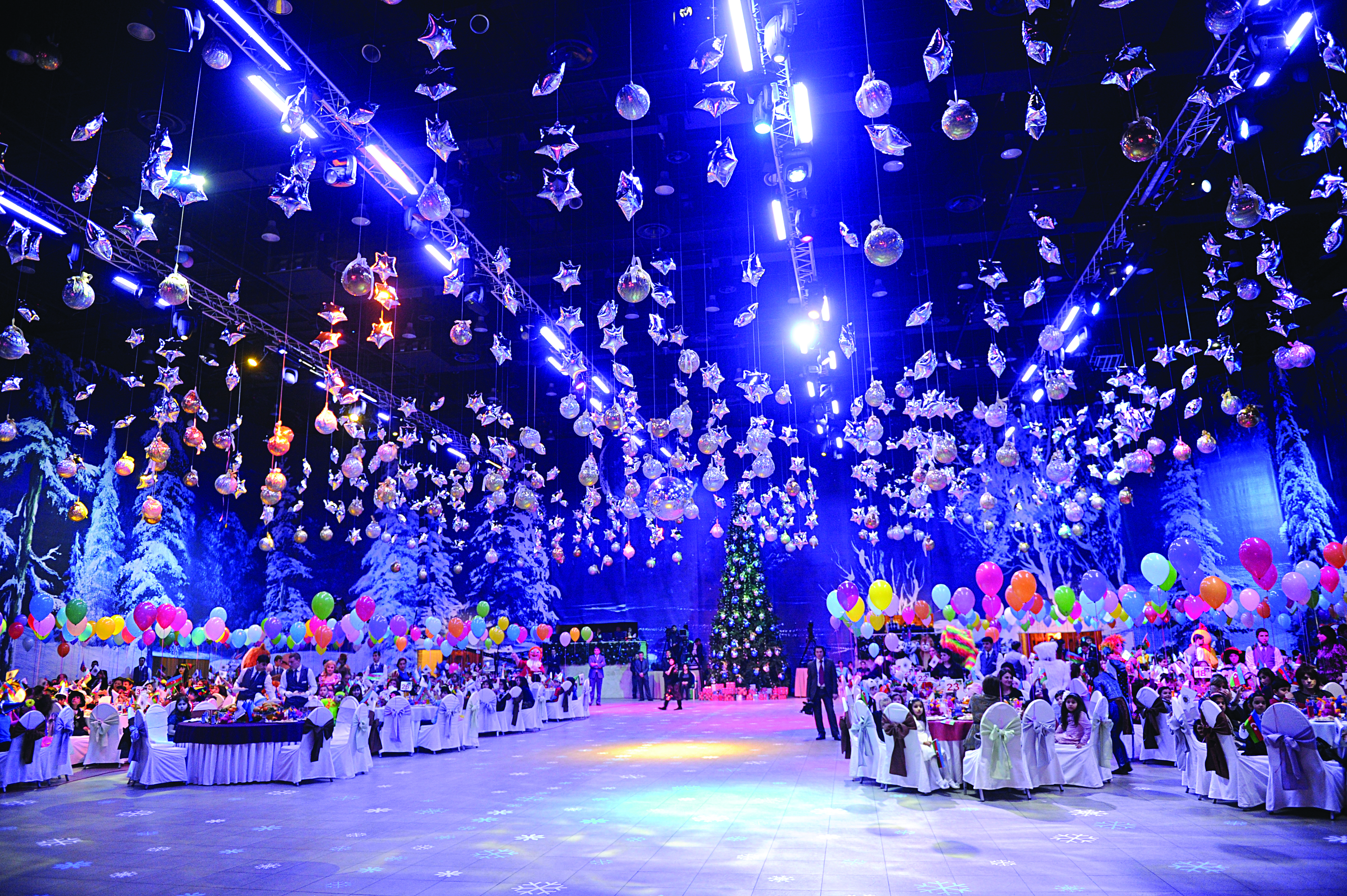 “Buta” sarayında Yeni il şənliyi 2011